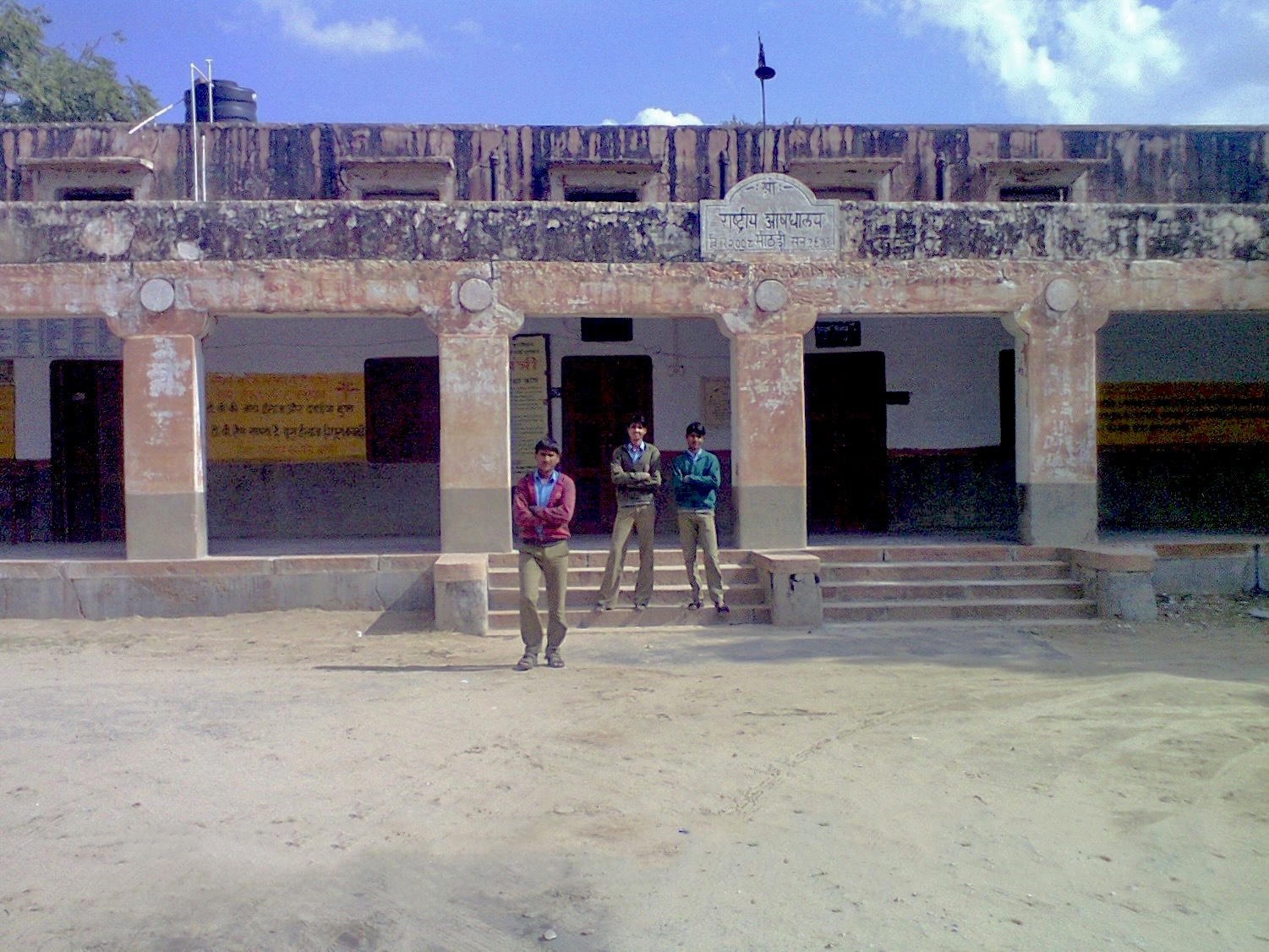 1951 में स्थापित "राष्ट्रीय औषधालय" जो वर्तमान में (2013) में राजकीय सामुदायिक स्वास्थ्य केन्द्र के रूप में क्रमोन्नत हो चुका है।